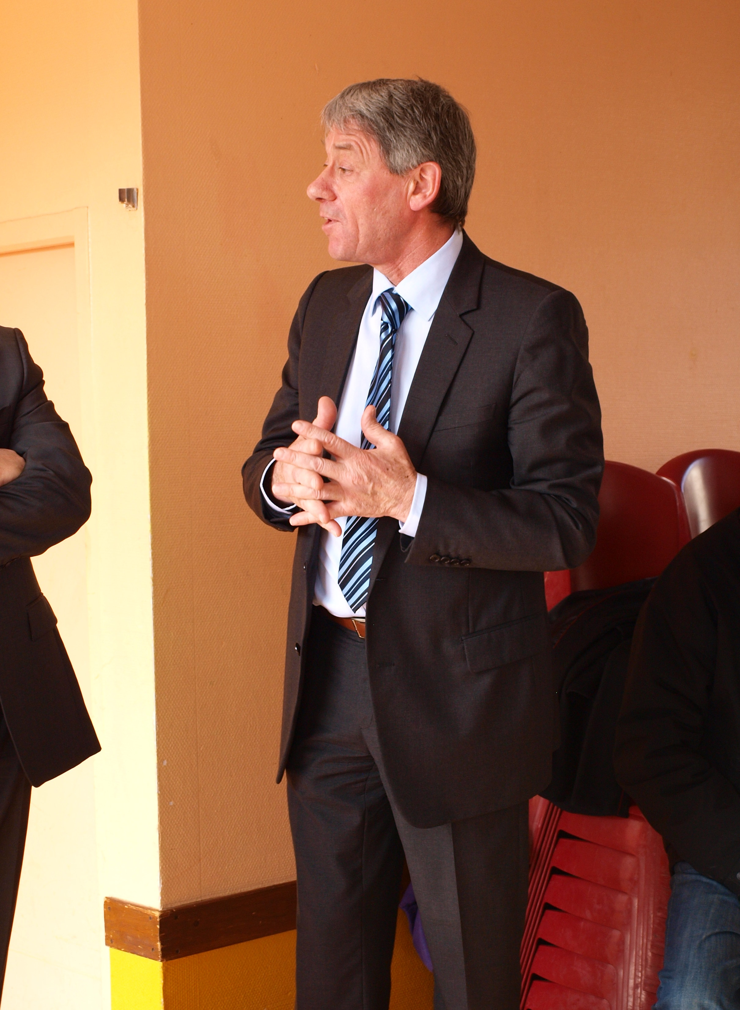 Villemanoche (Yonne, France) ; inauguration de l'extension de l'école communale ; le conseiller général.